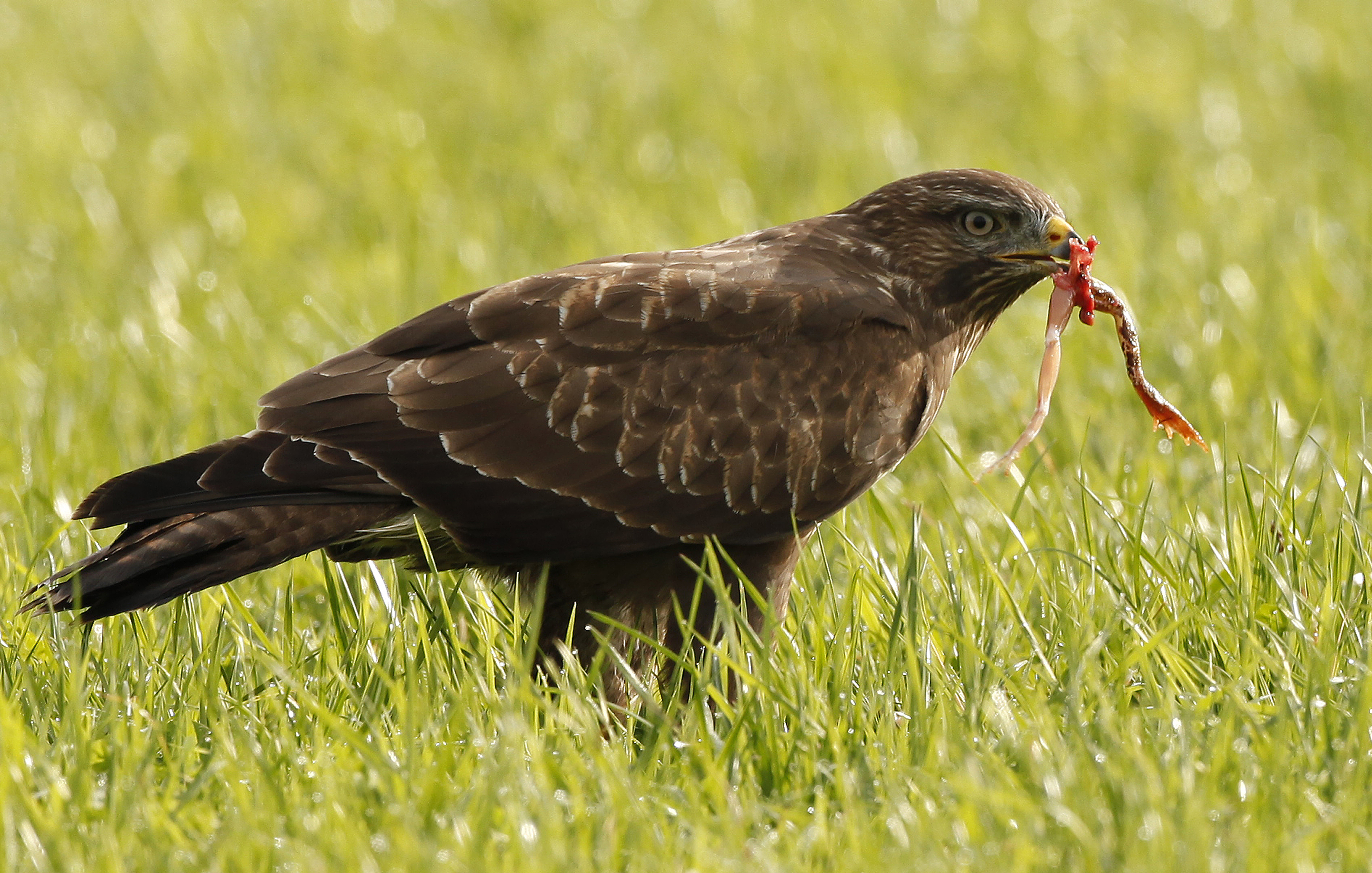 Hiireviu (Buteo buteo) konnaga 2012